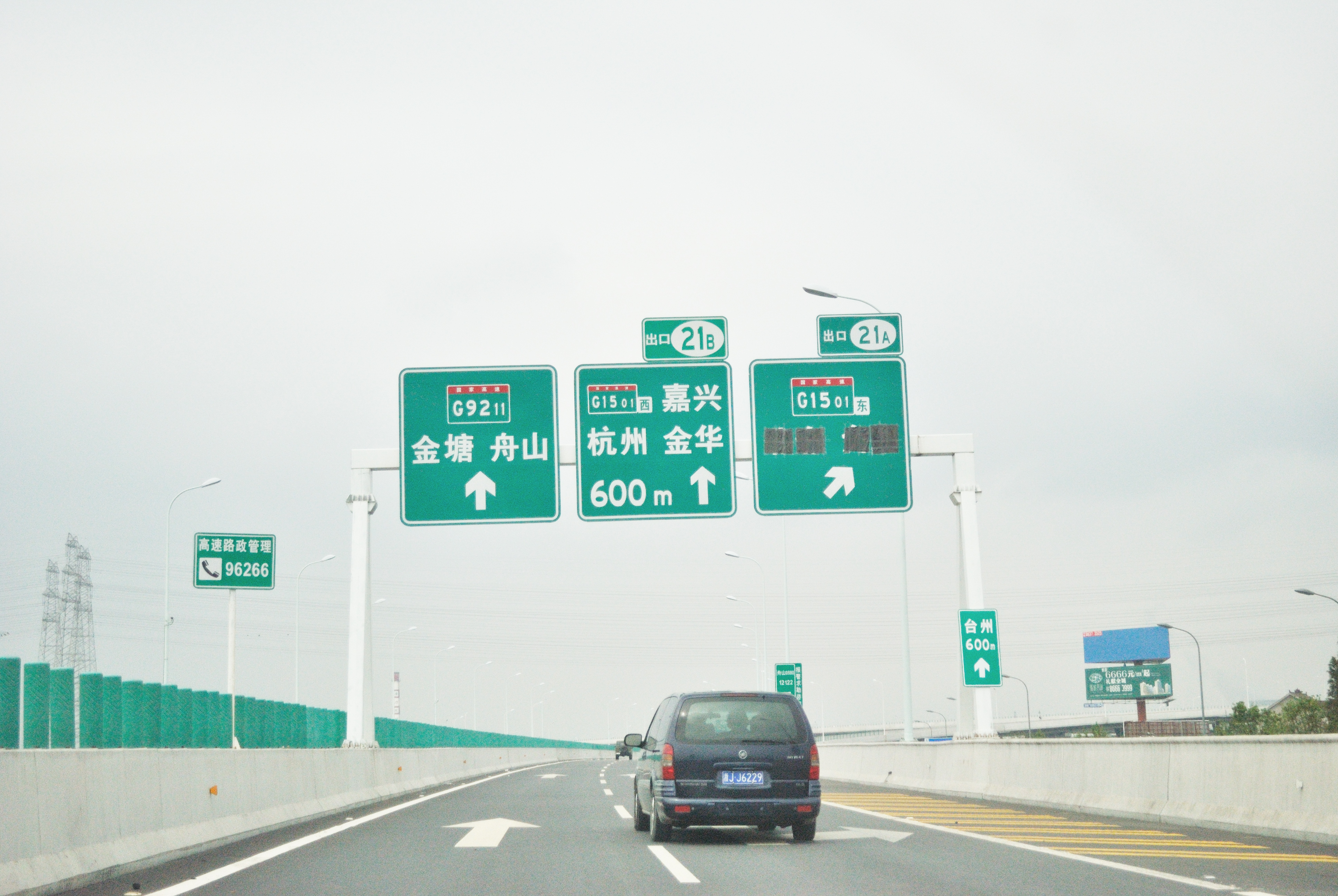 G9211/G1501蛟川枢纽